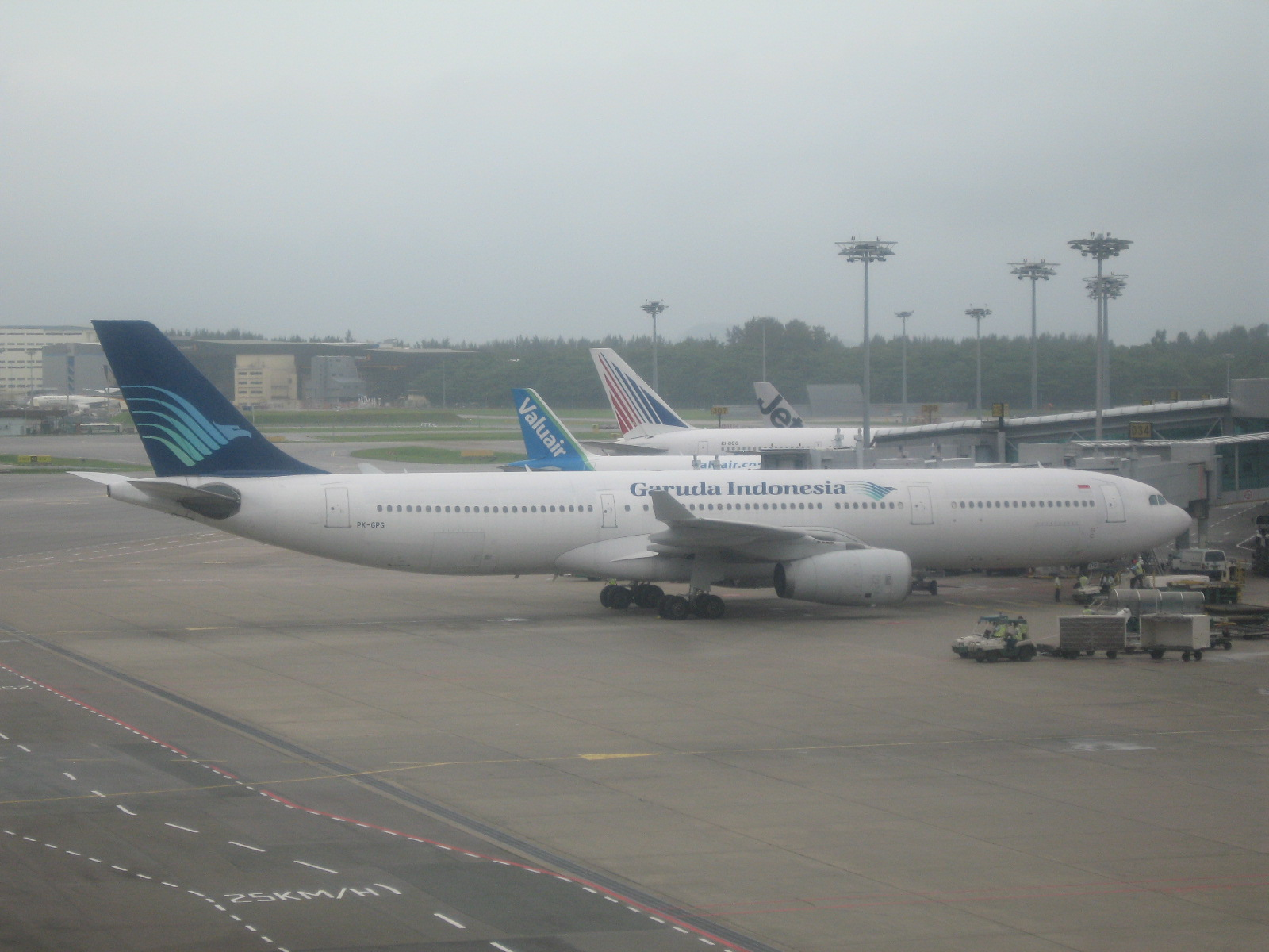 Garuda Indonesia, Airbus A330-300 aircraft (PK-GPG) at Singapore Changi Airport.